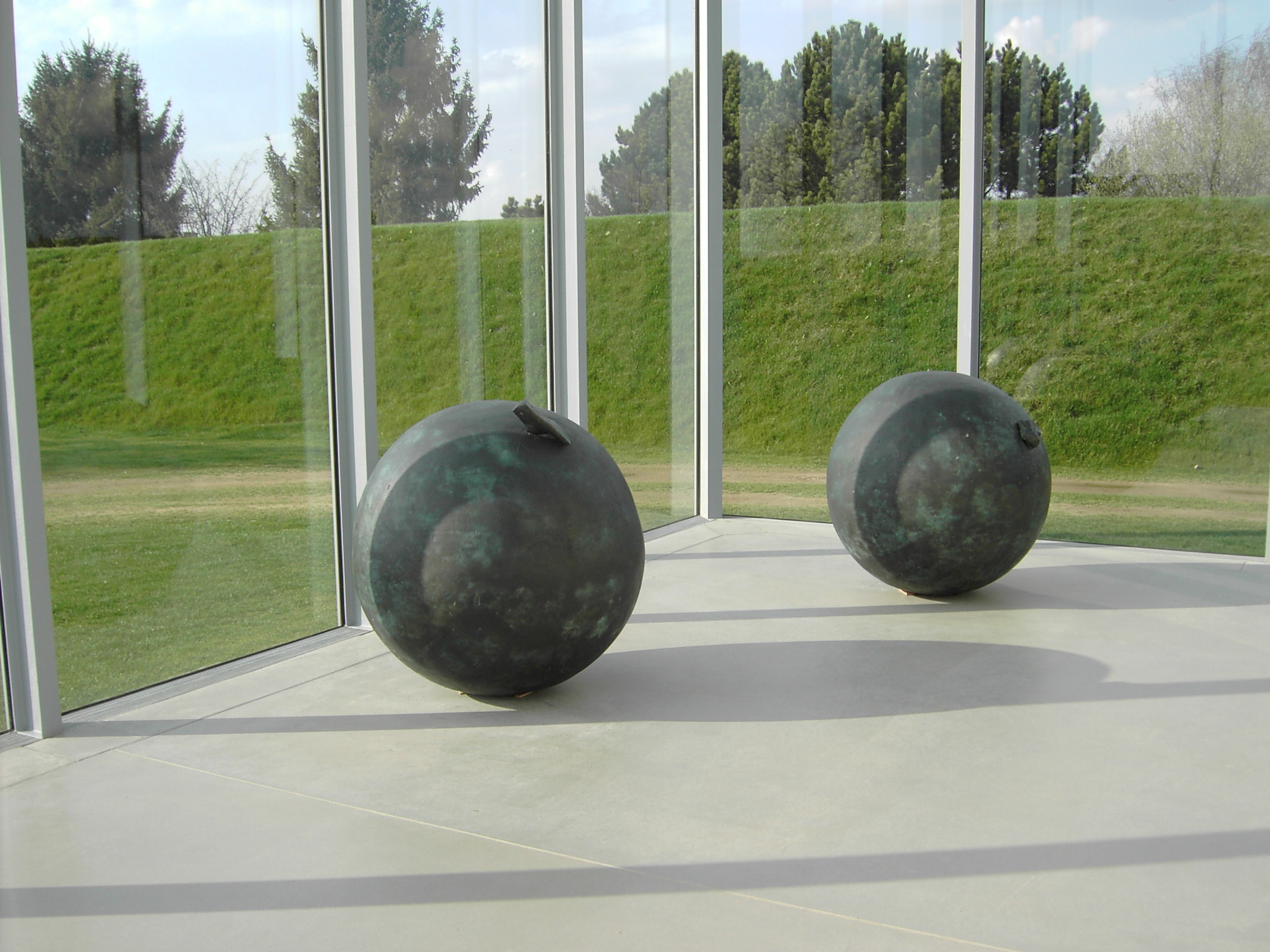 Langen Foundation, Museumsinsel Hombroich, Raketenstation